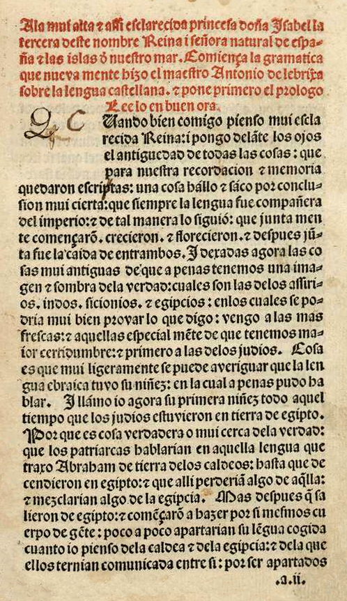 Íncipit y prólogo de la Gramática castellana de Antonio de Nebrija (Salamanca, 18 de agosto de 1492).